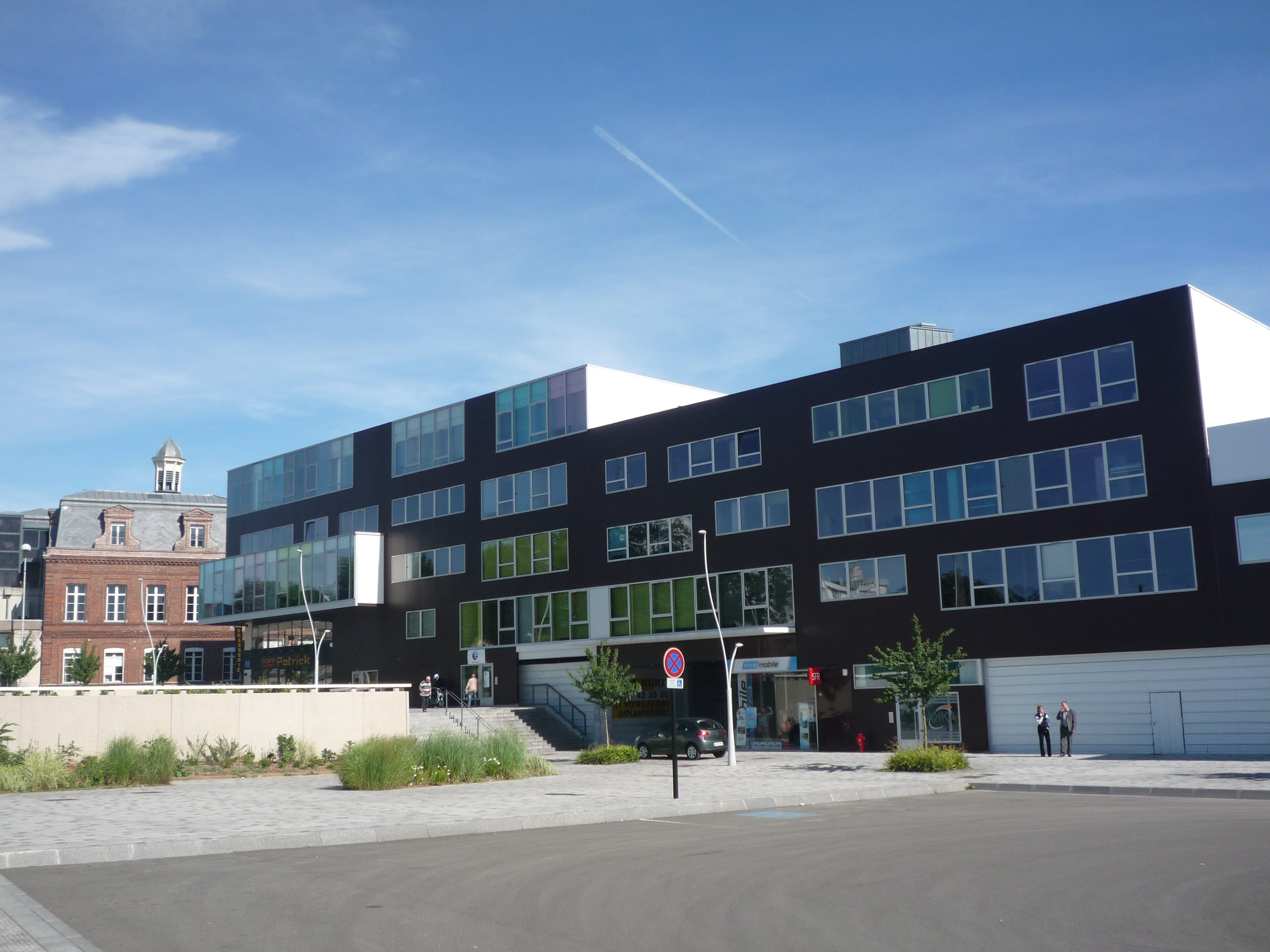 Les Jardins de Valmont, Anzin, Nord, Nord-Pas-de-Calais, France.